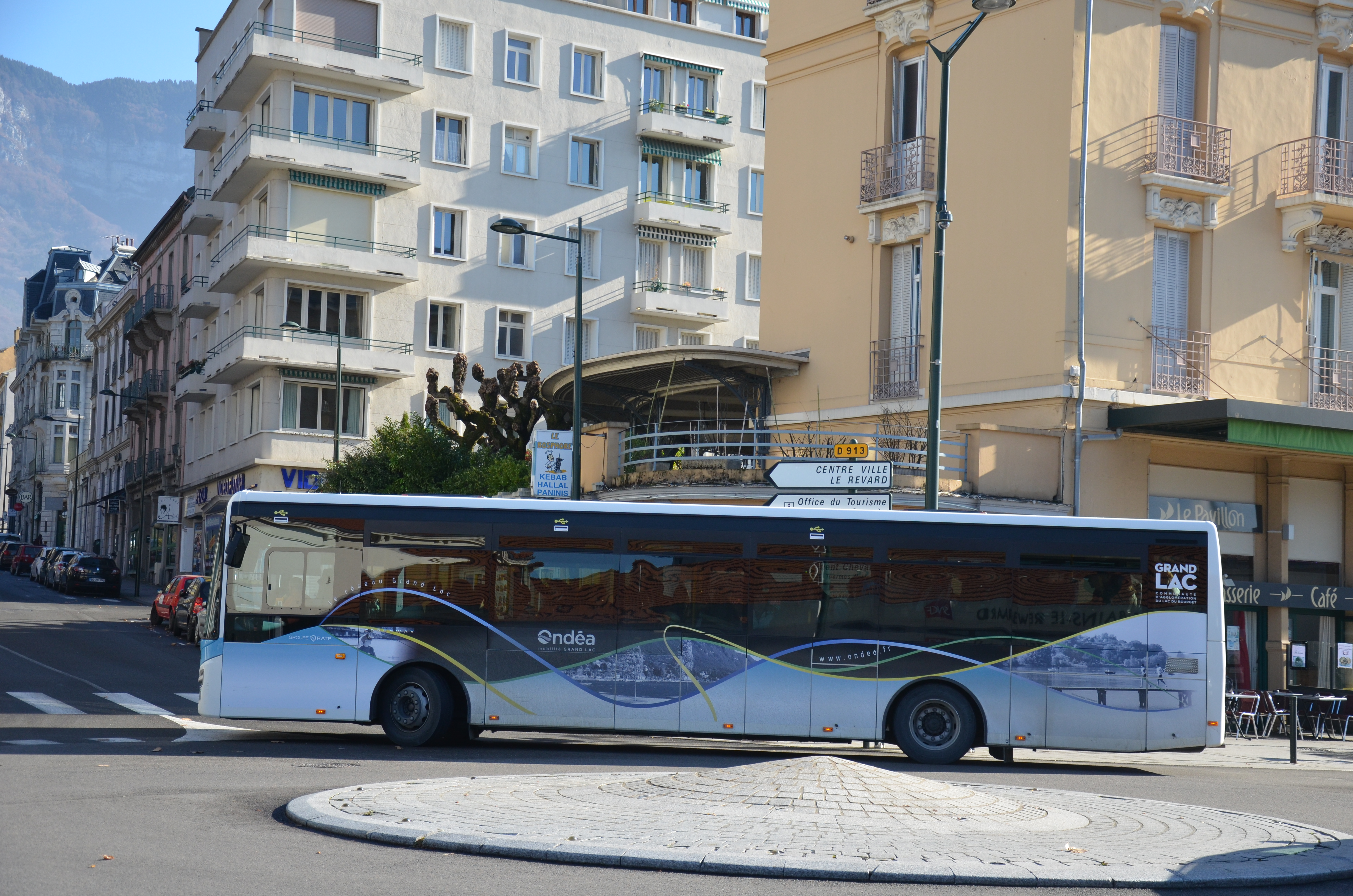 Iveco Bus Crossway LE n°44 sur la ligne 3 du réseau ONDEA d'Aix-les-Bains, près de l'arrêt Gare SNCF.